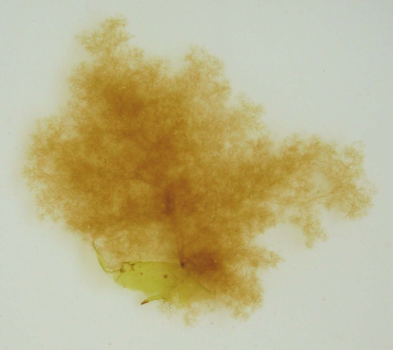 Ectocarpus siliculosus, hag a zo ur spesad bezhin gell, o kreskiñ war Ulva, bezhin glas. 03 a viz Gouere 2003, Perharidi, Rosko (Bro Leon, Breizh).